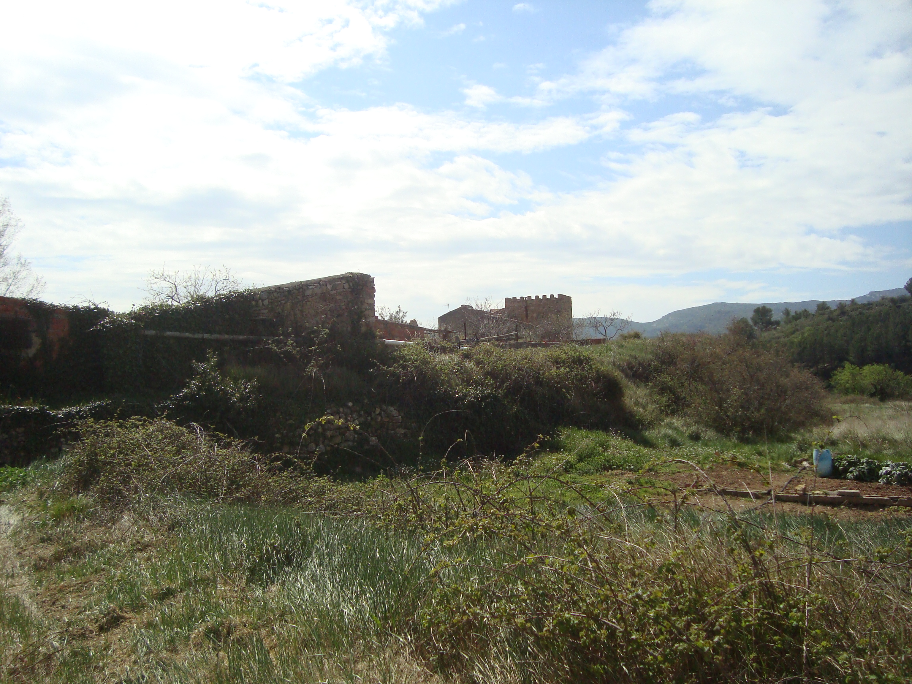 Torre el Molinar (Xert) 03.052-003.